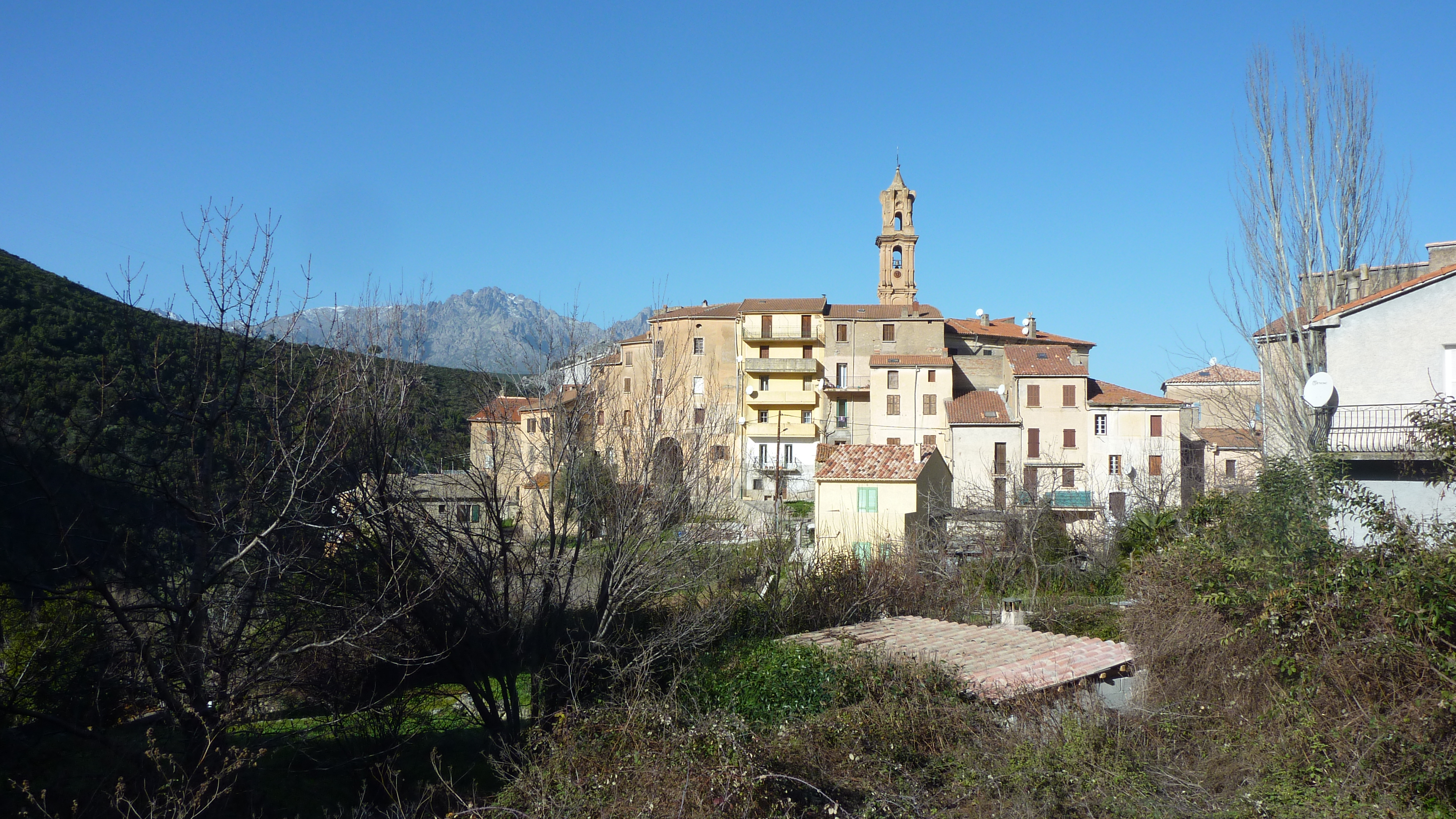 Village Corse